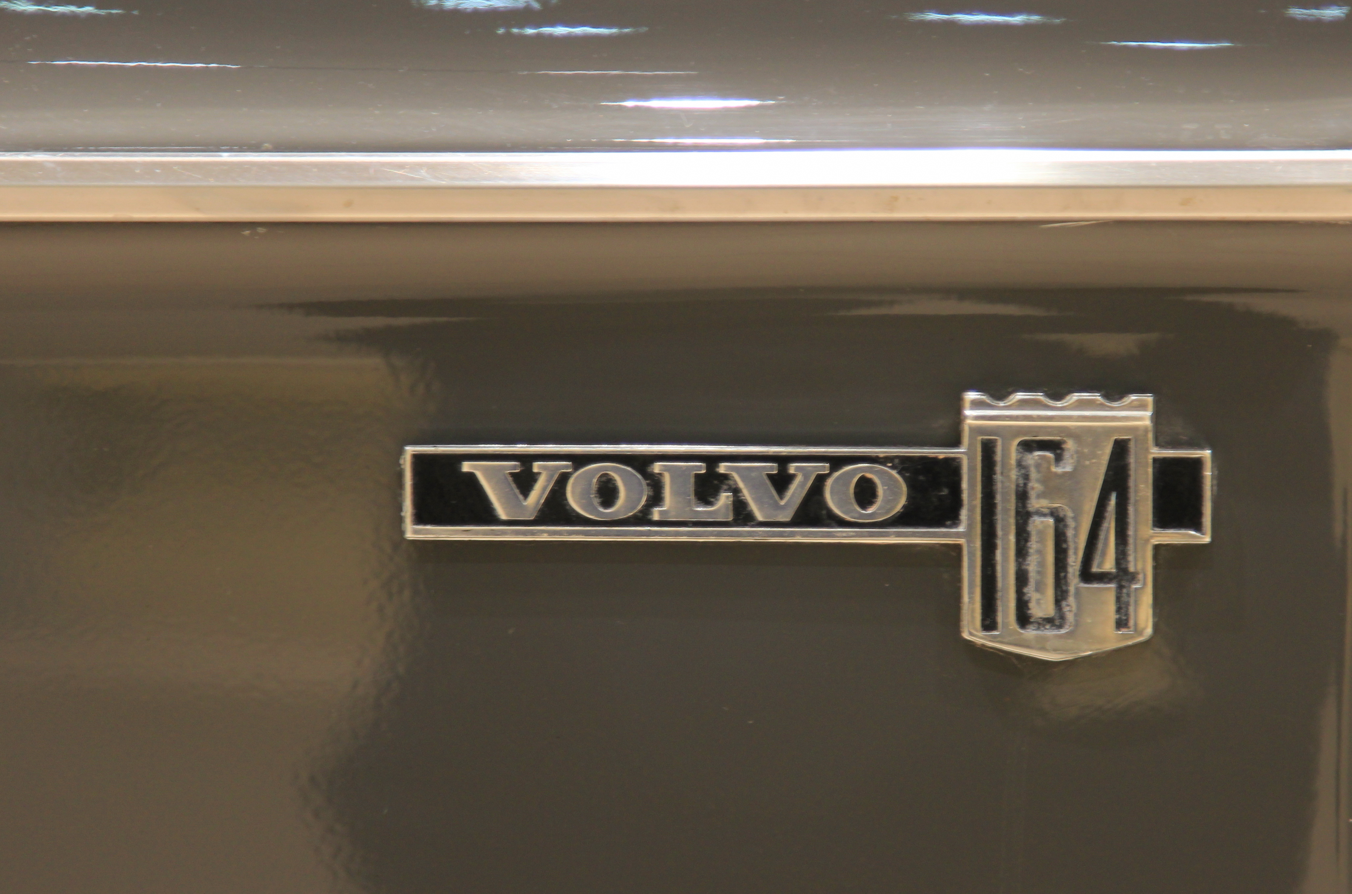 Volvo 164_шильда_Свид-Мобиль